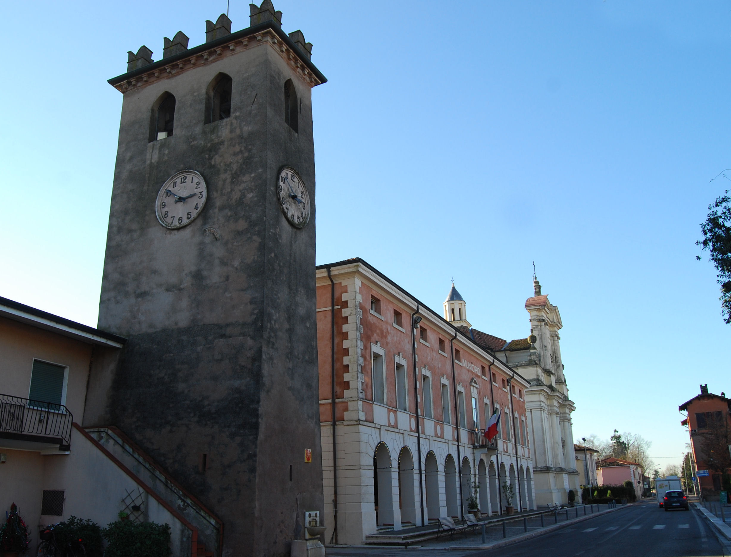 Rodigo, panorama.